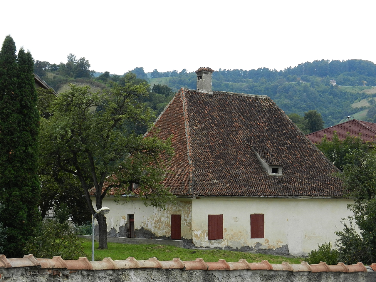 Casa Barac